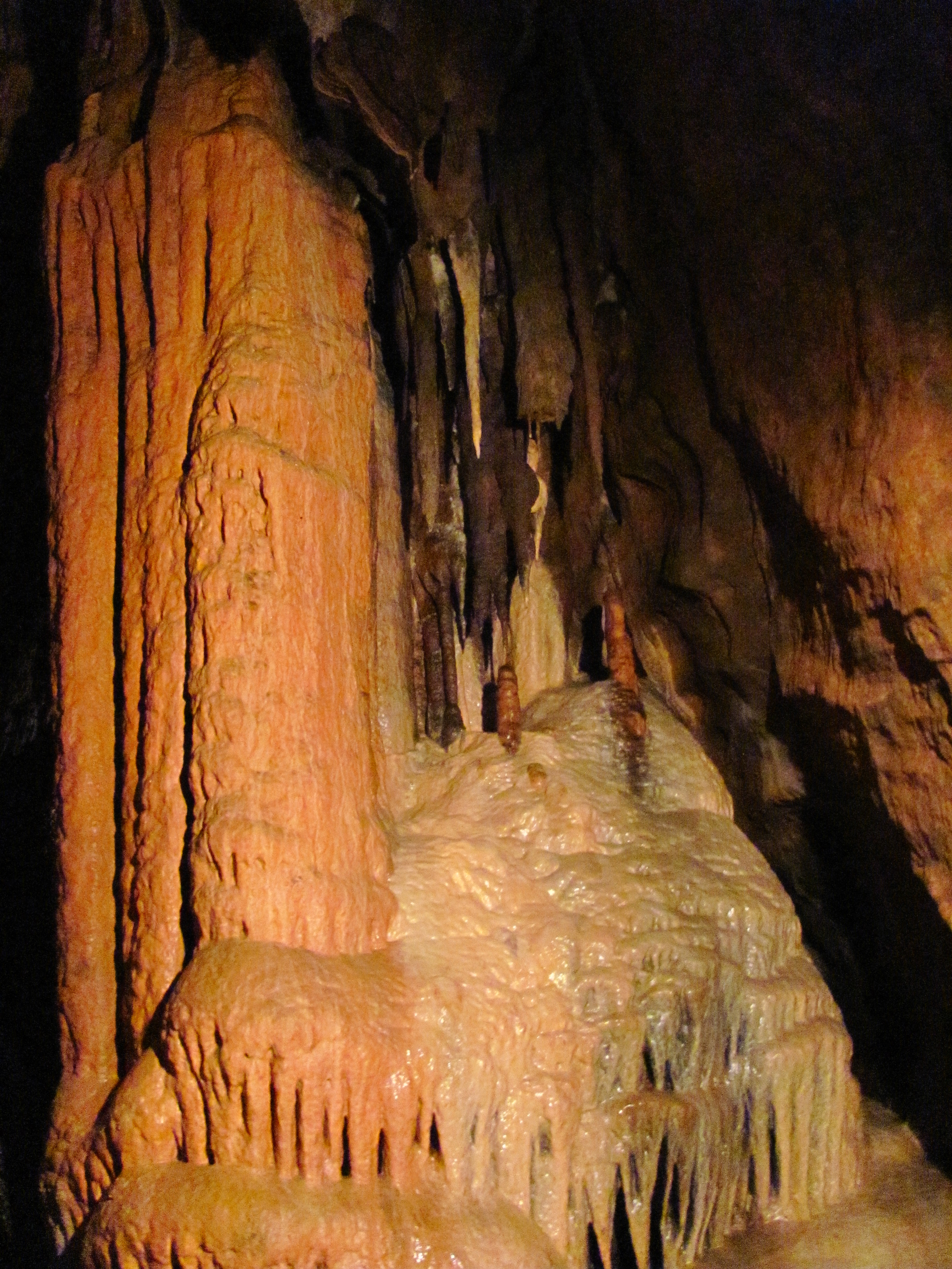 Српски (ћирилица): Пећински накит у пећини Орловача This image was uploaded as part of Trace of Soul 2016.